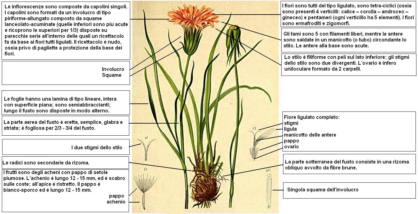 Podospermum roseum - Descrizione delle parti della pianta